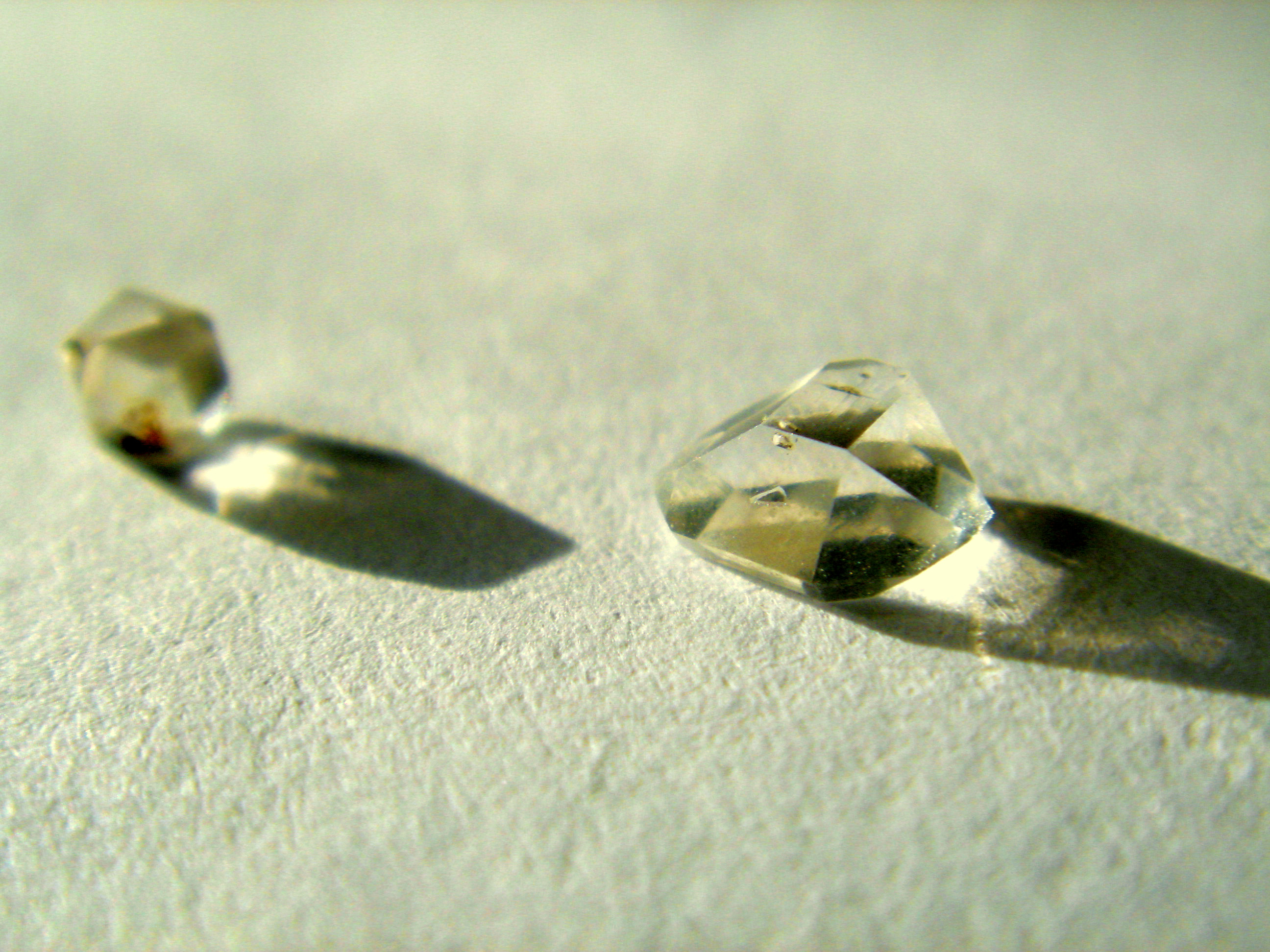 Kvarckristályok Ozsdoláról (Erdély)